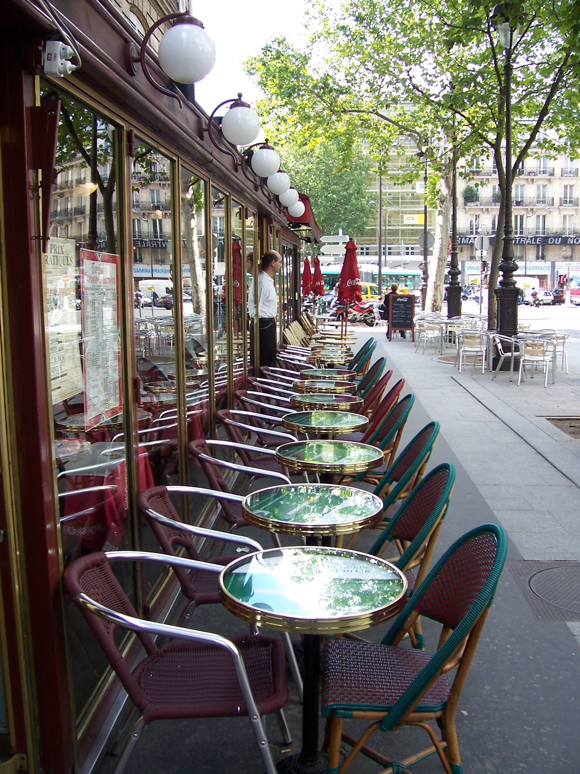 terrasse d'un café de Paris